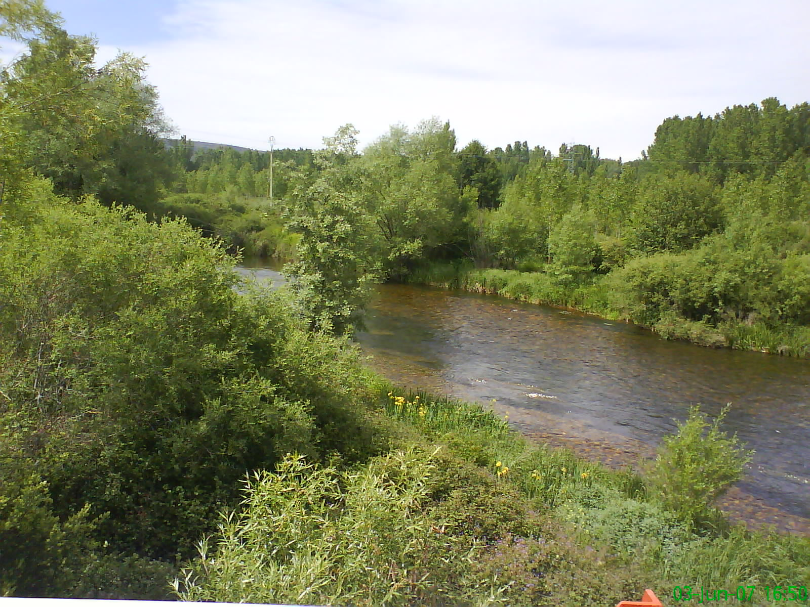 Río Luna a su paso por Santiago del Molinillo, en el municipio de Las Omañas (León, España)